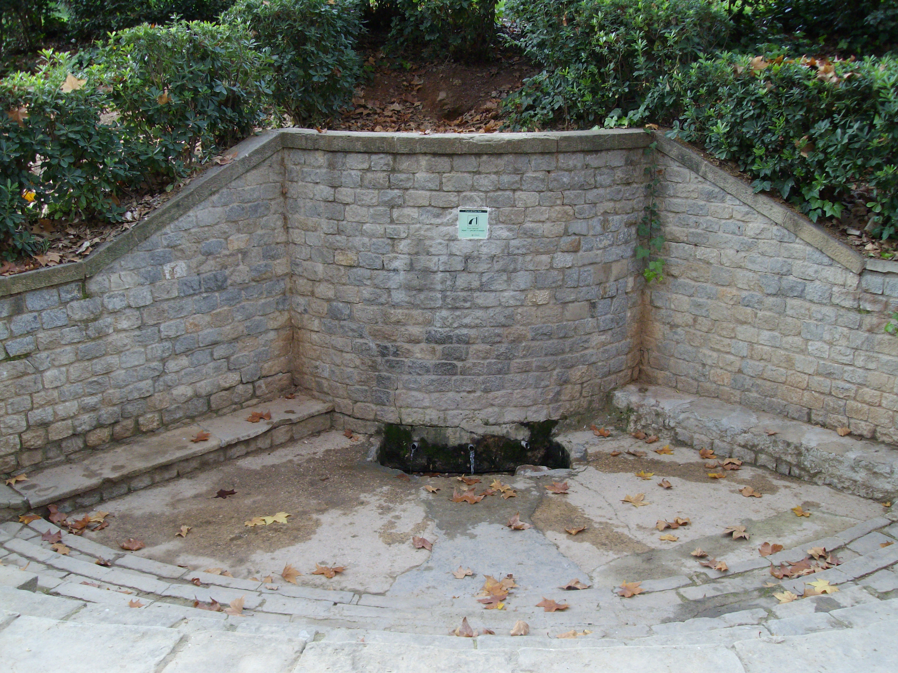 Fuente de Can Rull. Fuente natural situada en el barrio de Can Rull, en Sabadell, Barcelona (España).